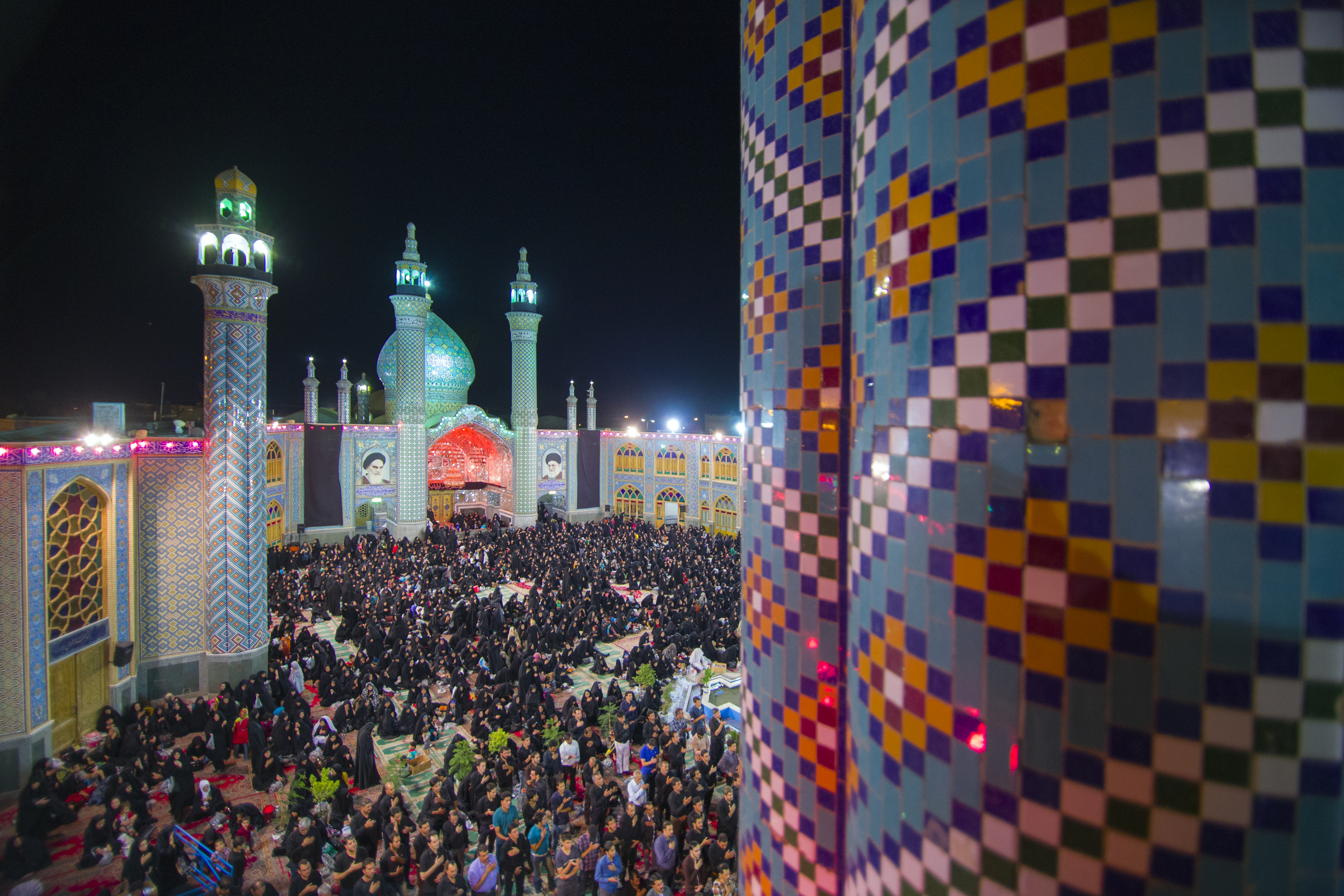 محمد اوسط مشهور به هلال علی و محمد هلال، (۱۴–۶۴ ه. ق)، فرزند بلافصل علی بن ابیطالب و نوه محمد می‌باشد.مقبره این امامزاده در شهرستان آران و بیدگل می باشد.